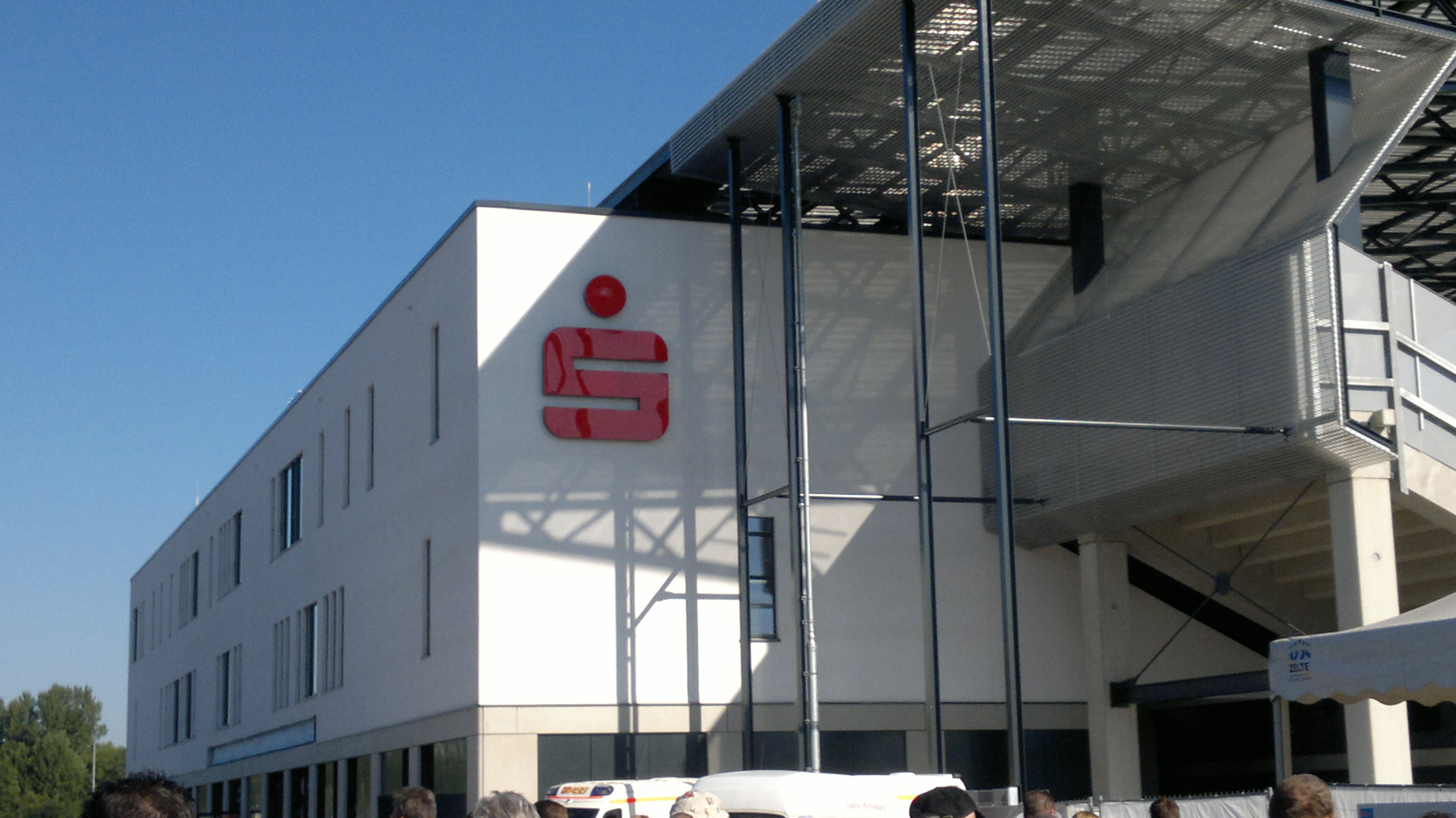 Das Hauptgebäude des „Stadion Essen“ am Eröffnungstag, Sparkassenlogo